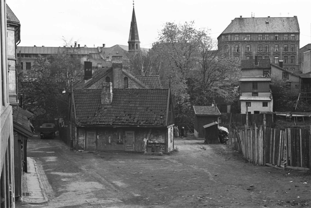 Fattigstugangen i Fjerdingen i Oslo gikk til høyre for huset bild på bildet. Foto: Ferdinand Lorentz Prall Elster, september 1942. Fra Oslo byarkivs samling.